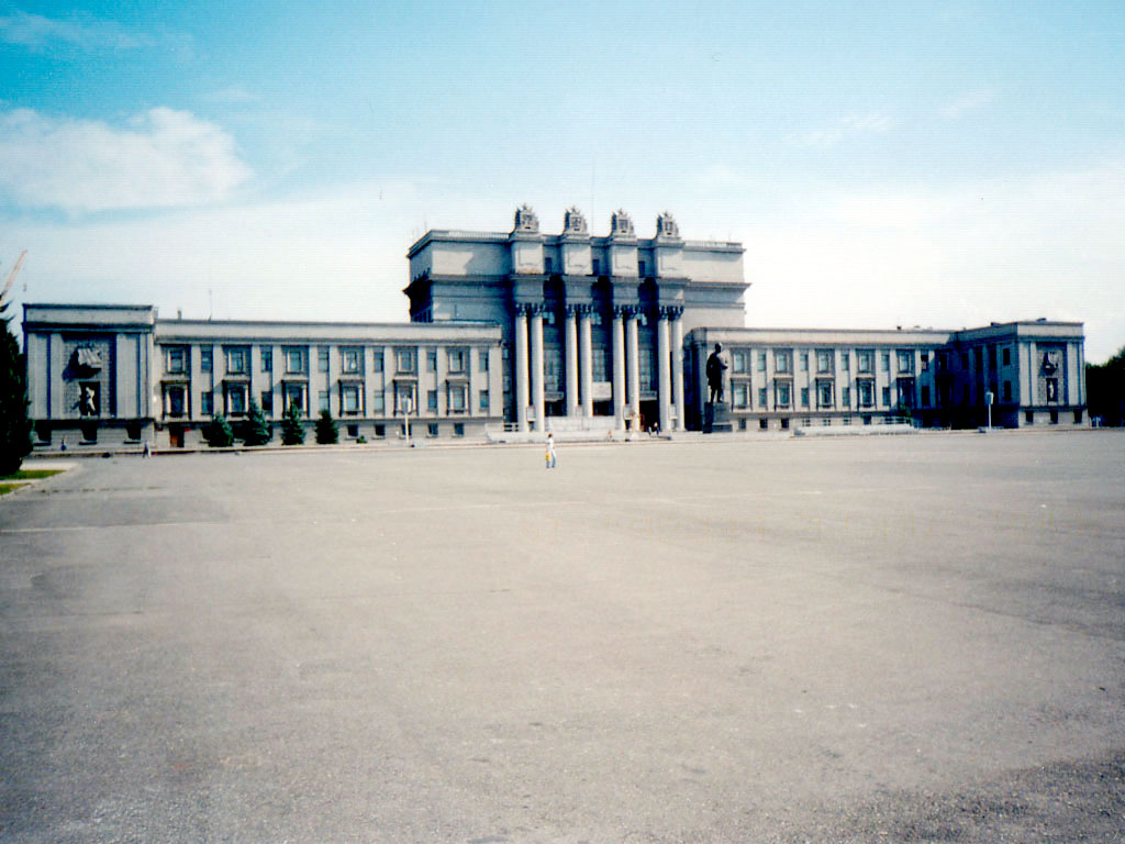 Staatliches Opern- und Baletttheater wurde in der Sowjetzeit gebaut.